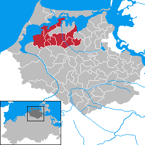 Former Amt Barth-Land in Mecklenburg-Vorpommern - District Nordvorpommern